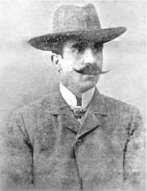 Самуел Леви